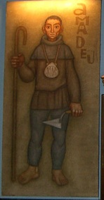 Amadeu, el pastor de Núria; mural ceràmic a l'ermita de Sant Gil de Núria. Retallat d'una foto de la capella.